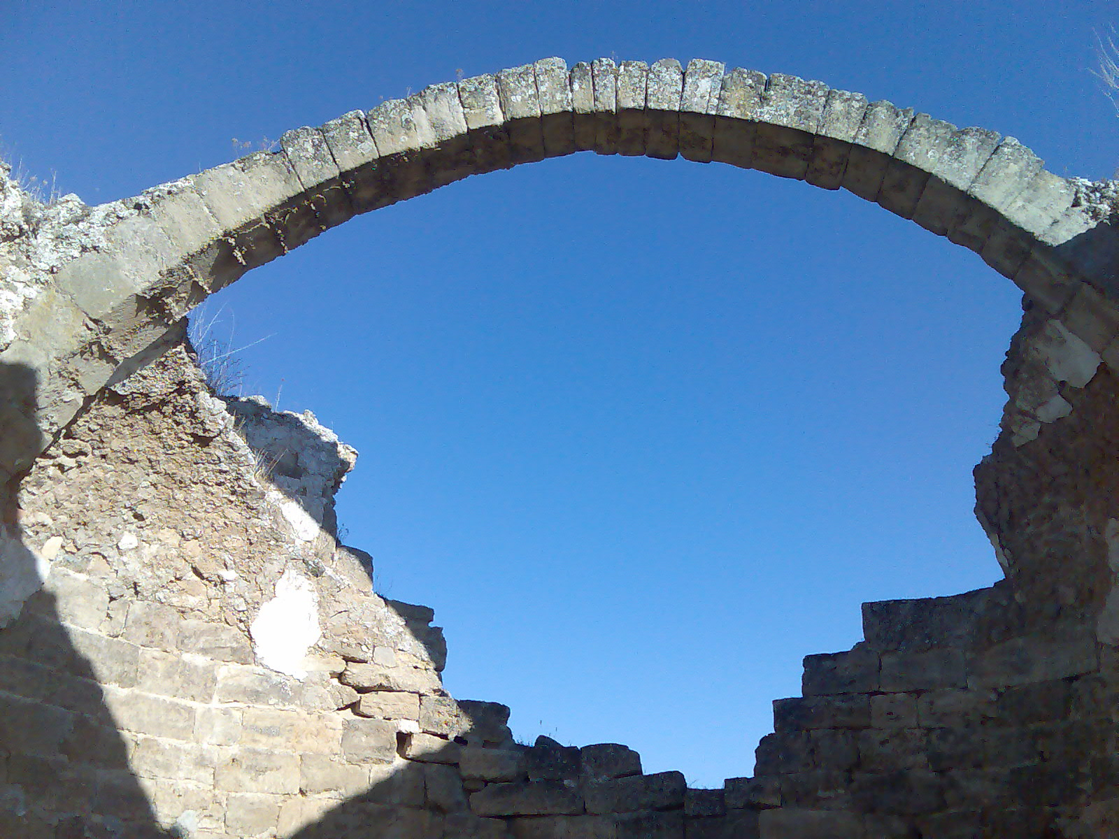 Arco románico en la basílica visigoda de Recopolis.jpg